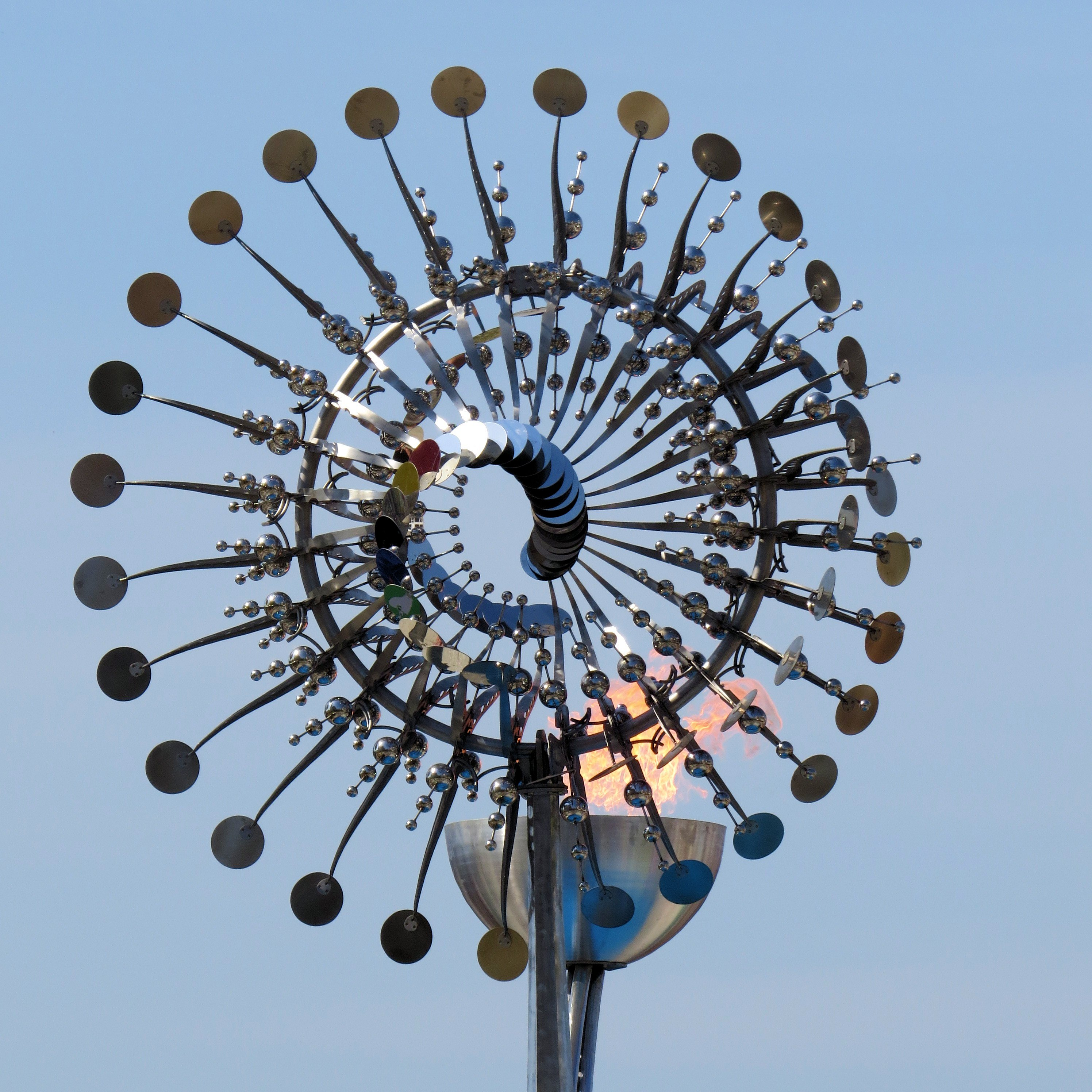 Segunda Pira olimpica, da rua/second Olympic Flame.